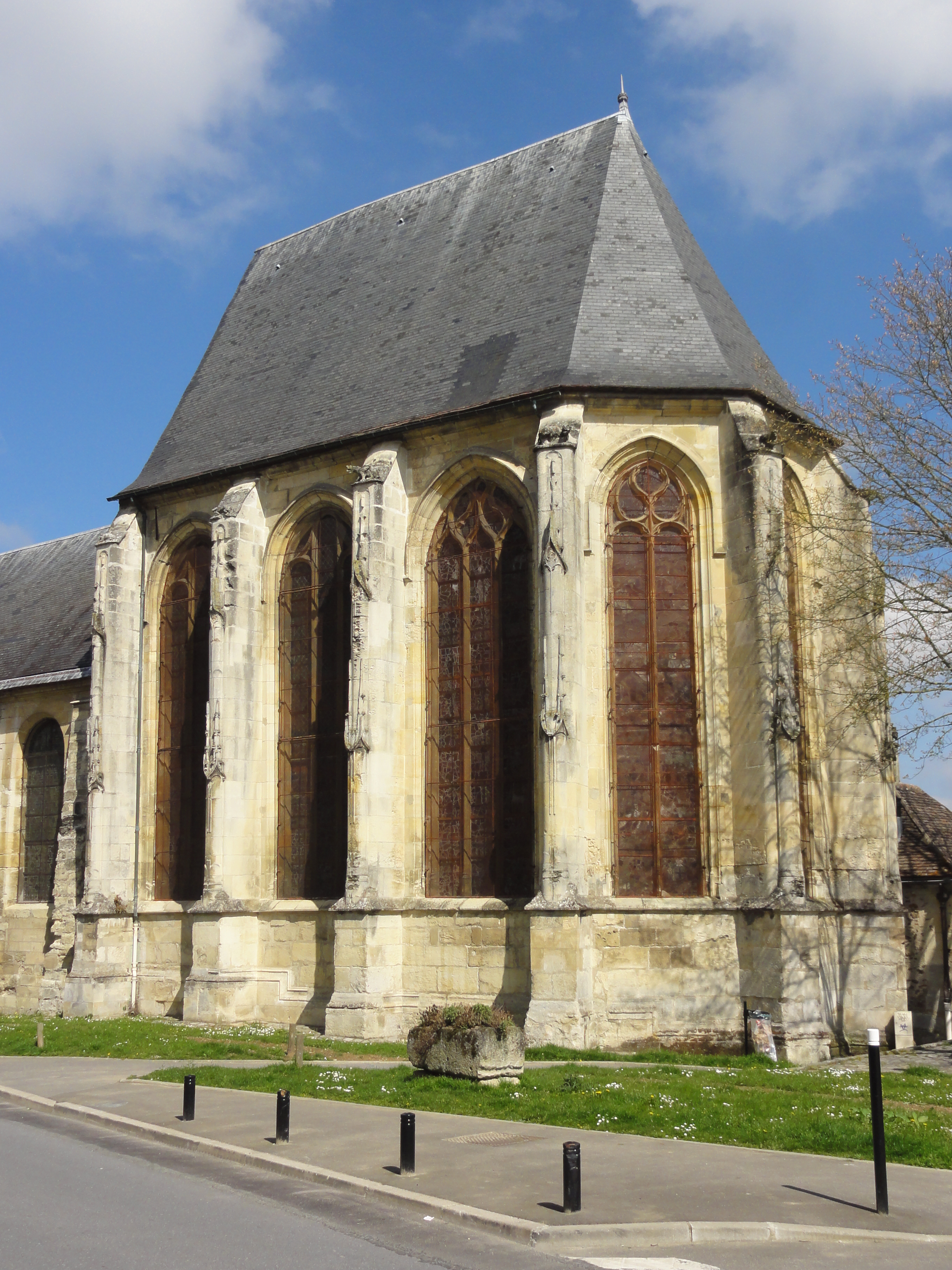 Église Saint-Acceul d'Écouen - voir titre.